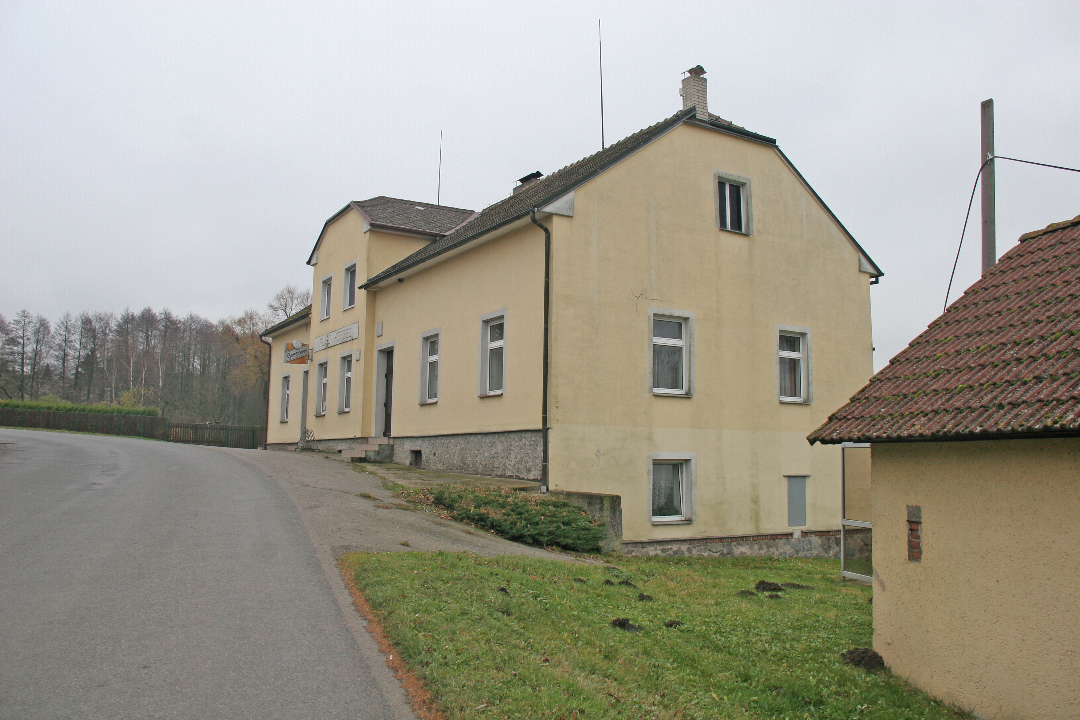 Libkov hospoda